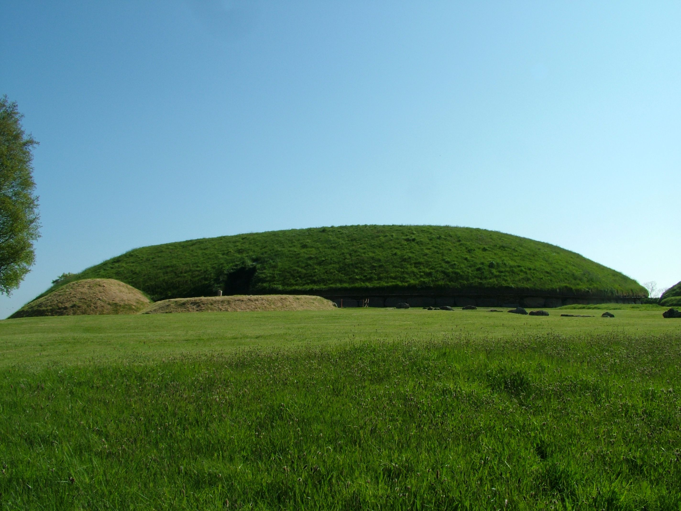 Knowth, Irland, Gesamtansicht